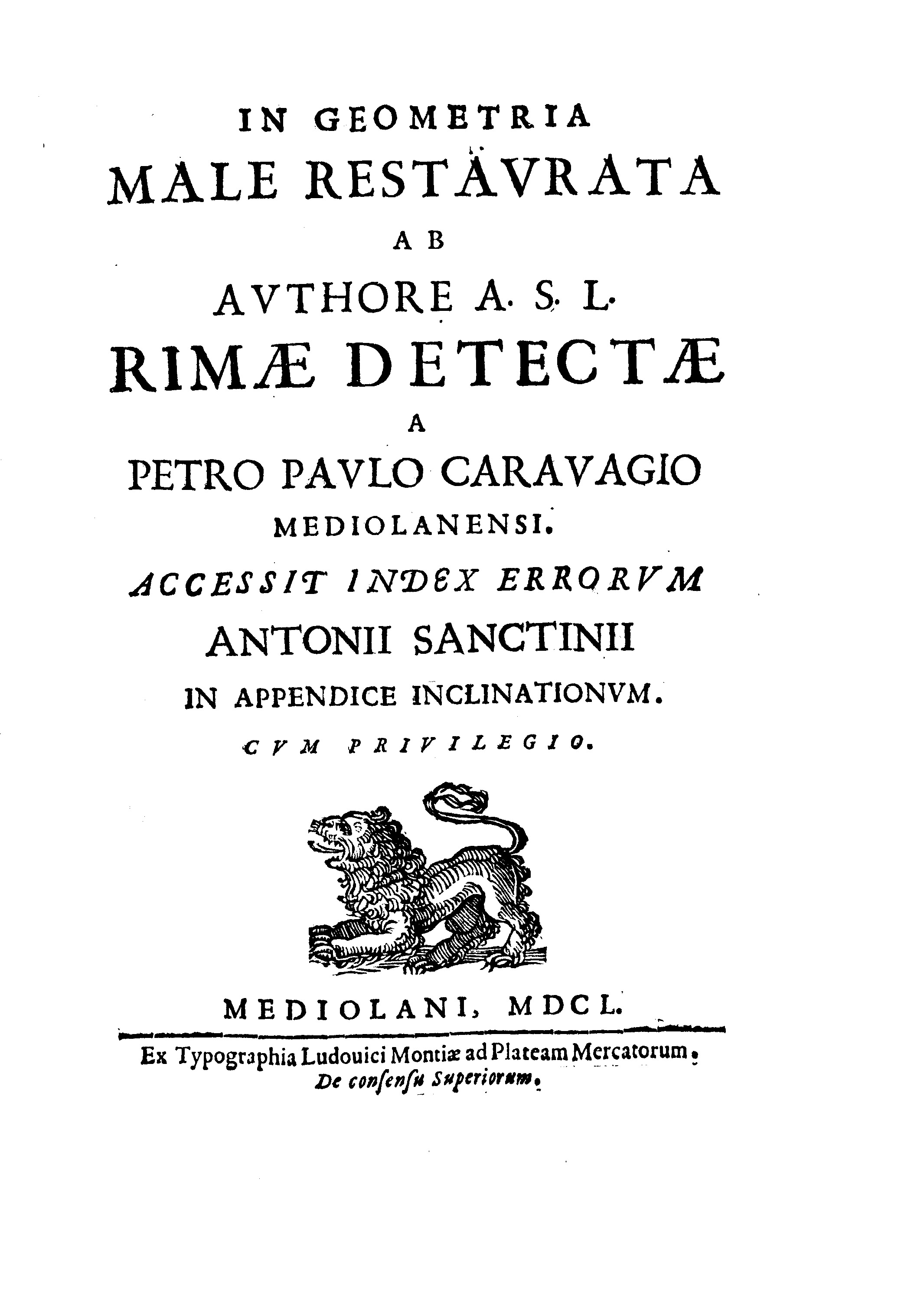 In geometria male restaurata ab authore A.S.L. rimae detectae a Petro Paulo Carauagio Mediolanensi. Accessit index errorum Antonii Sanctinii in Appendice inclinationum. - Mediolani : ex typographia Ludouici Montiae, 1650. - [8], 79, [1] p, [1] c. di tav. ripieg. ; 4º .